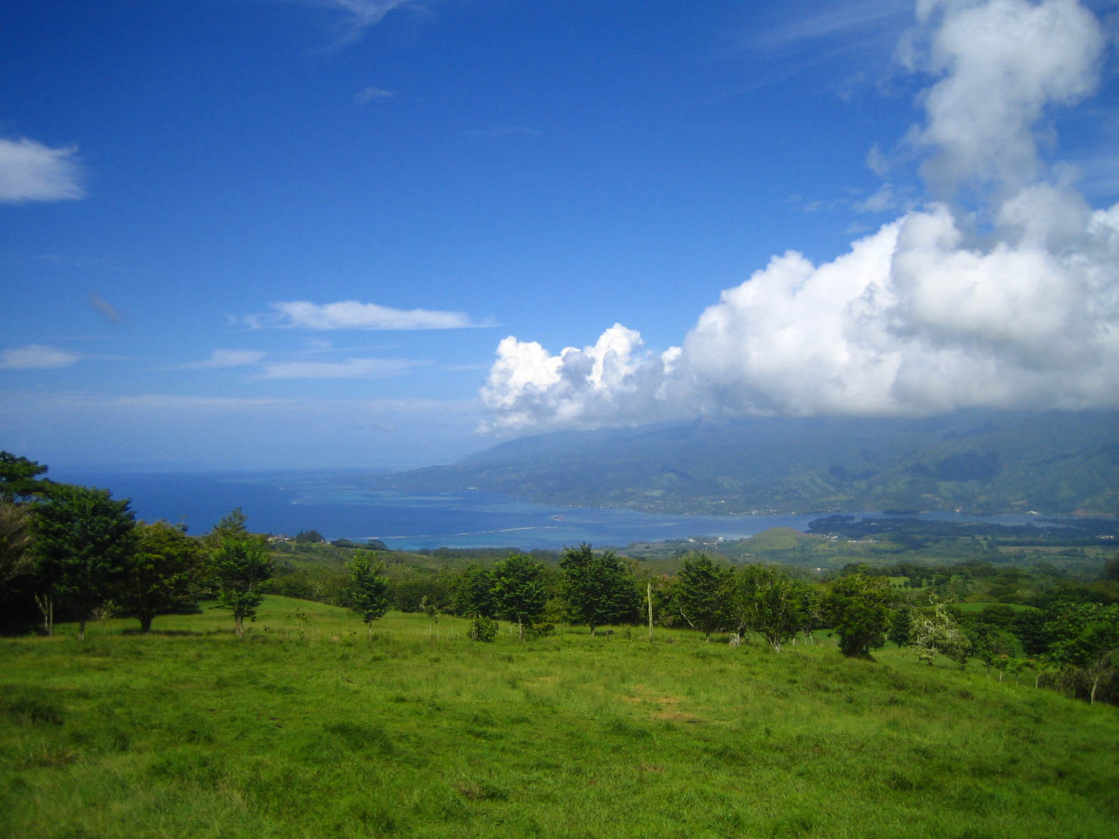 Blick von Tahiti Iti auf den Isthmus von Taravao und Tahiti Nui